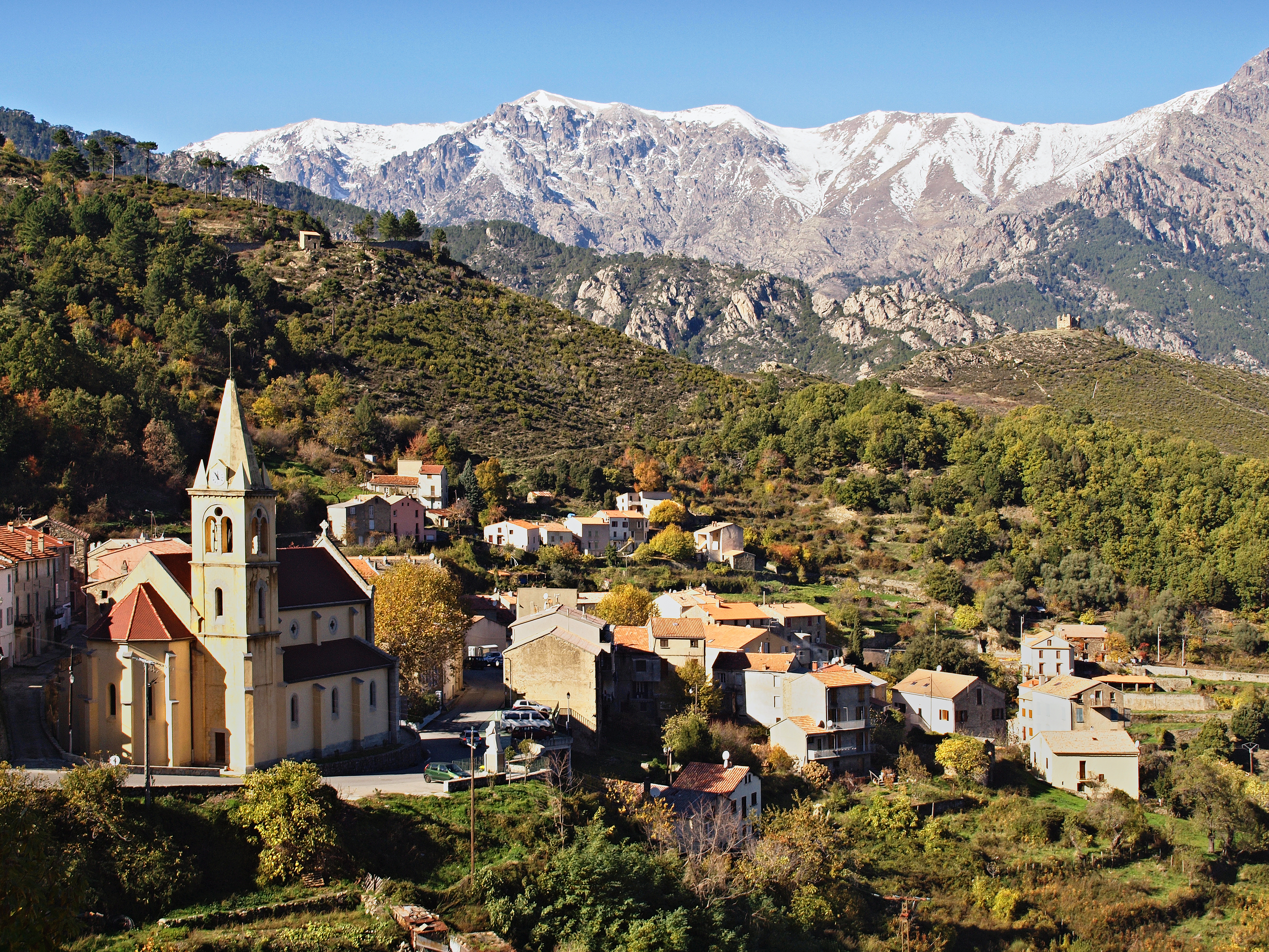 Vivario, Centre Corse (Corse) - Village, église Saint-Pierre, fortin de Pasciolo et Punta Banditi (1272 m)